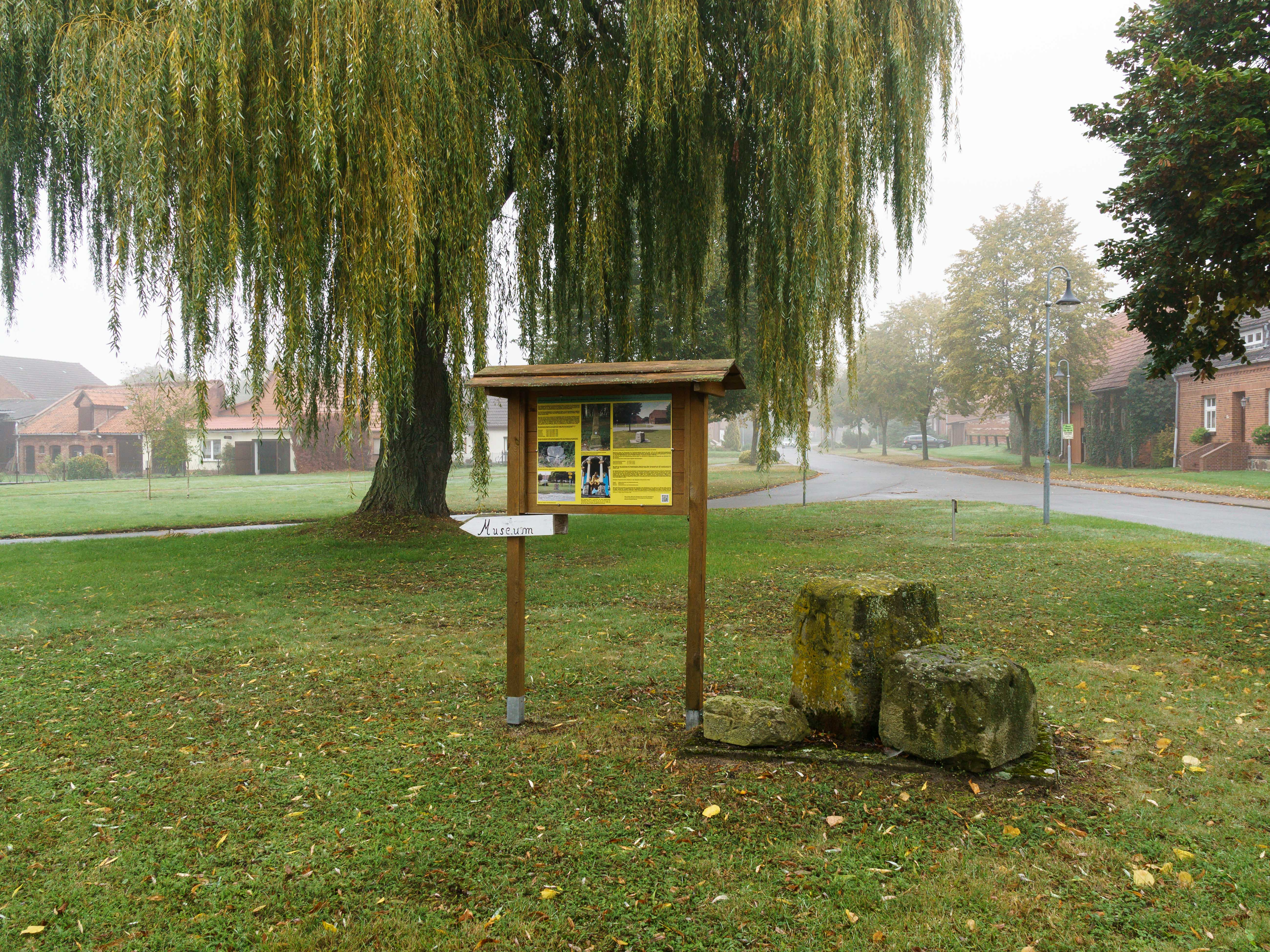 Preußischer Halbmeilenobelisk (1220) und preußischer Viertelmeilenwürfel (0304) auf dem Dorfplatz in Bretsch